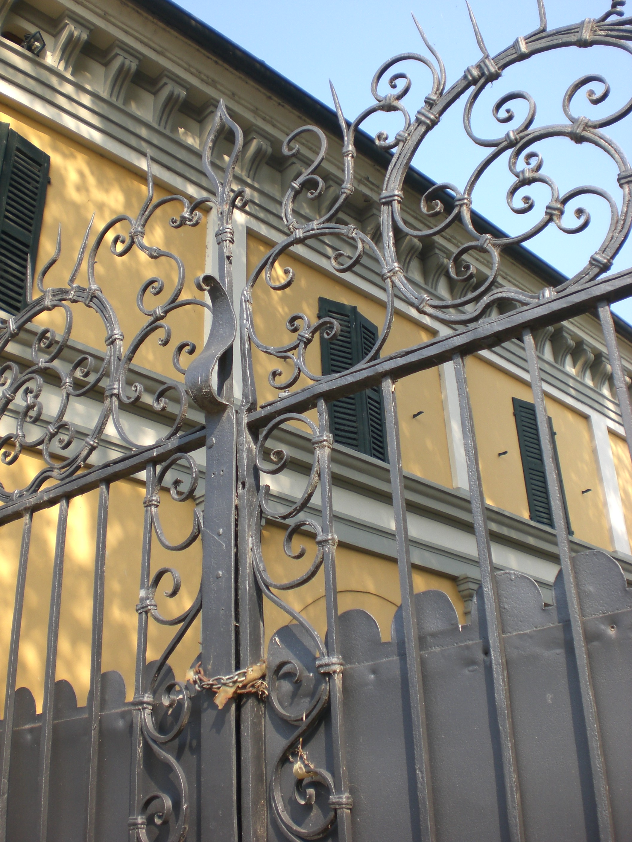 Brisckerly - Opera sua - Izano